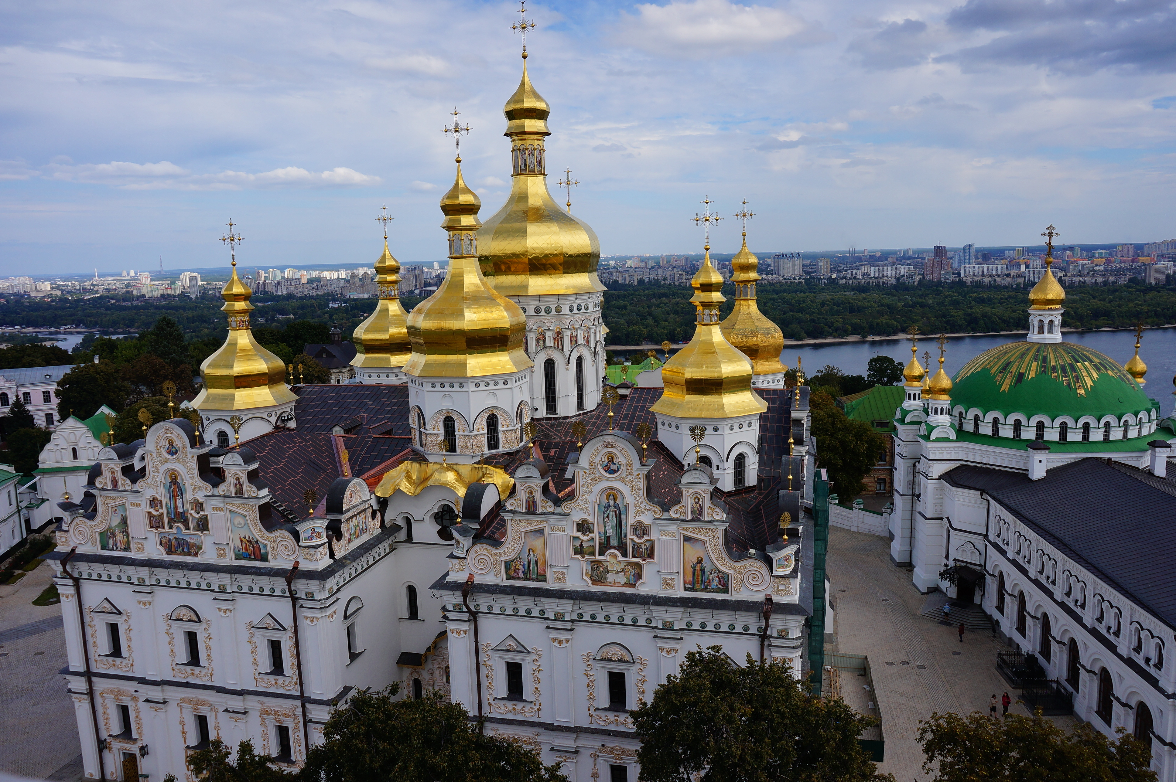 Собор Успенський (руїни), Київ, Лаврська вул., 9